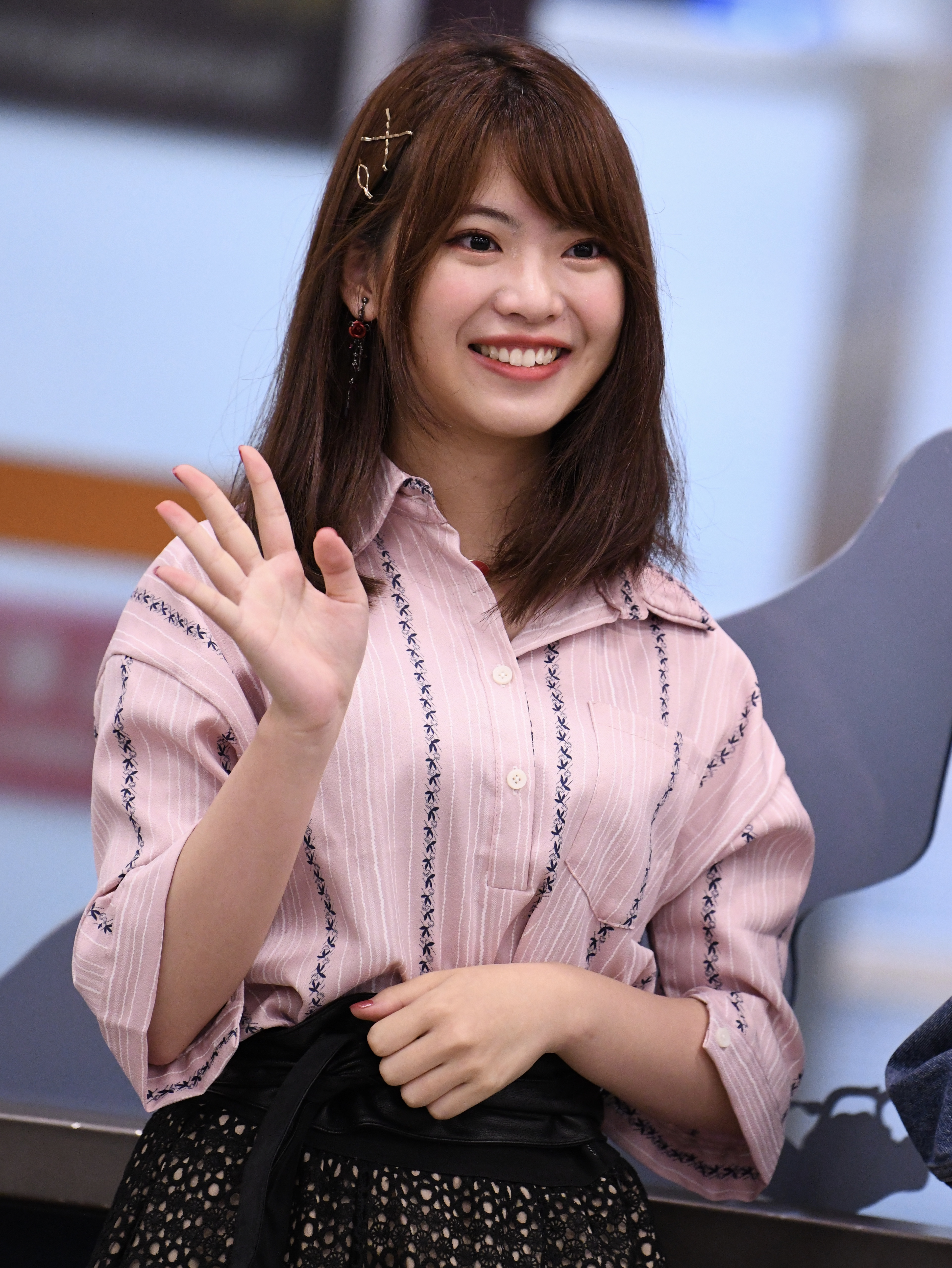 馬嘉伶